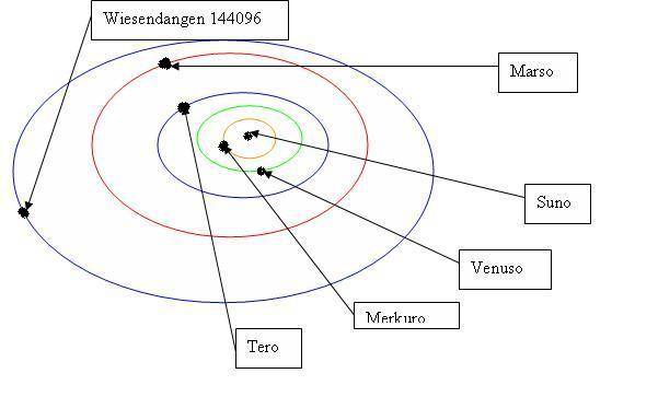 Grafikaĵo pri la orbito de la asteroido Wiesendangen Aŭtoro de la bildo: Dietrich Michael Weidmann